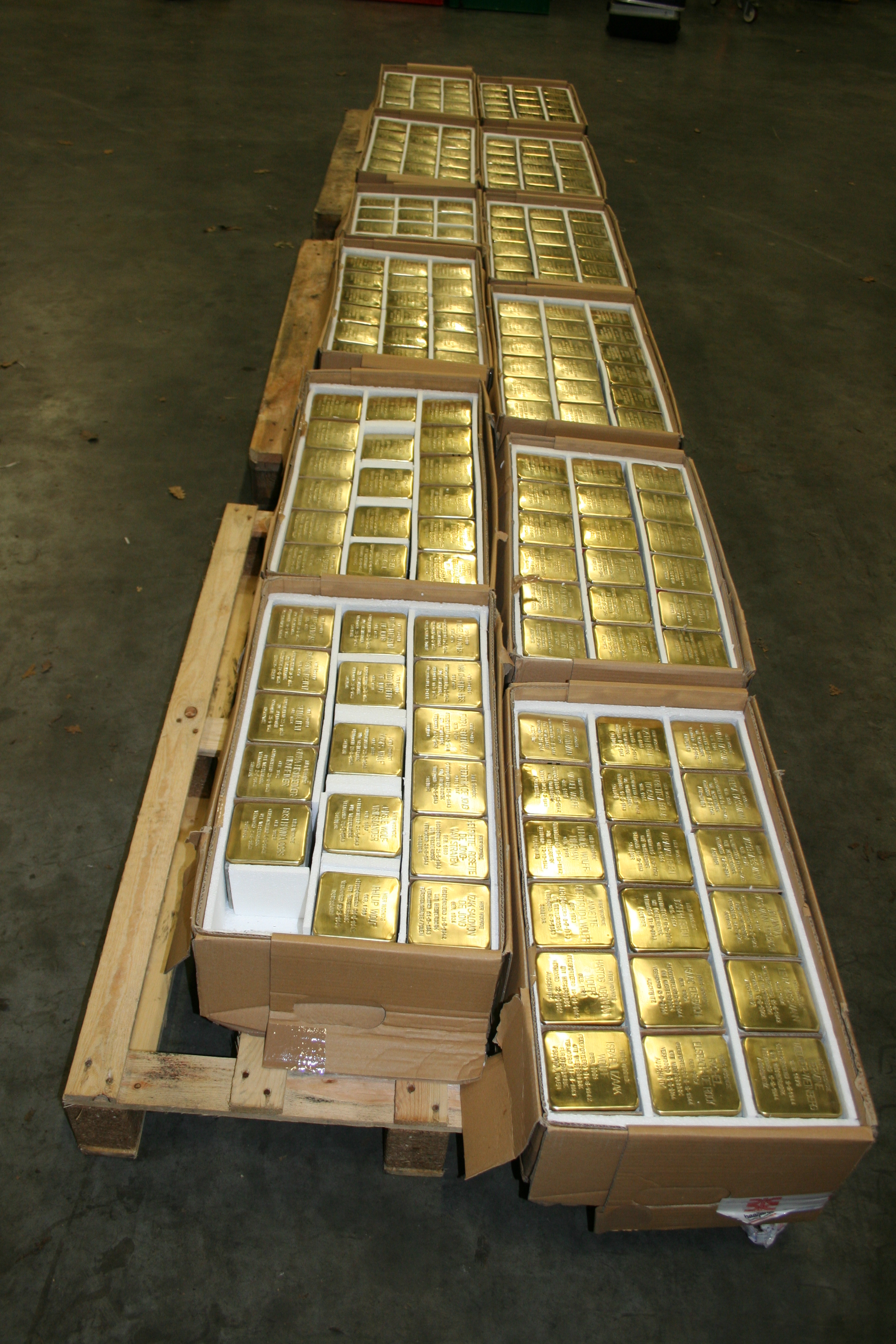 207 Struikelstenen liggen klaar om van 8 tot en met 11 april 2014 gelegd te worden.